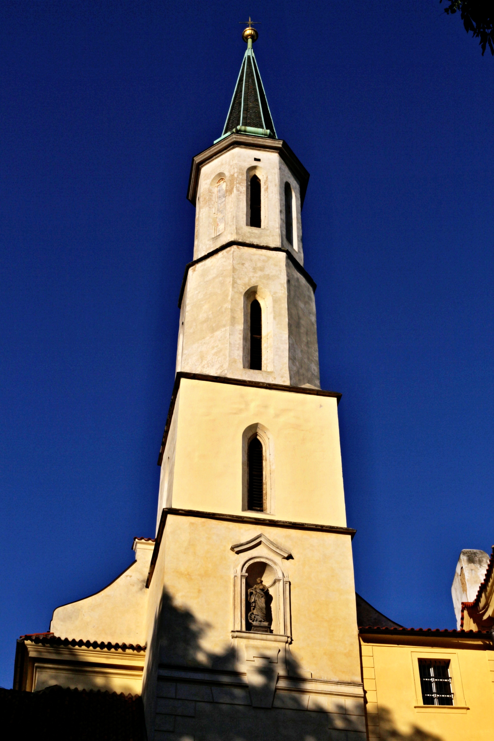 Praha - Nové Město, chrám sv. Kateřiny Alexandrijské